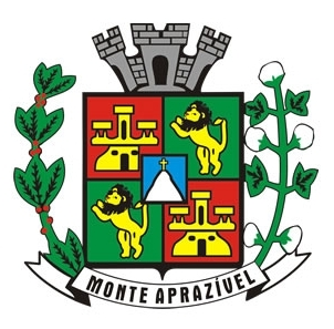 Brasão da cidade de Monte Aprazível, SP